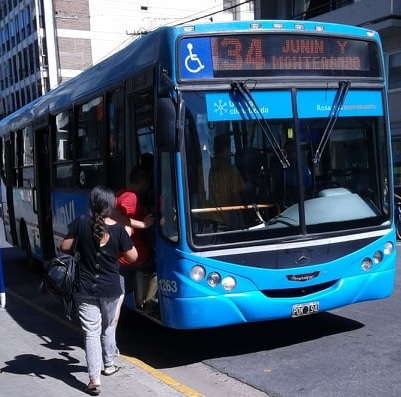 Mercedes-Benz OH 1618 (interno 1263) de la empresa Movi, operadora y explotadora de la línea 134.